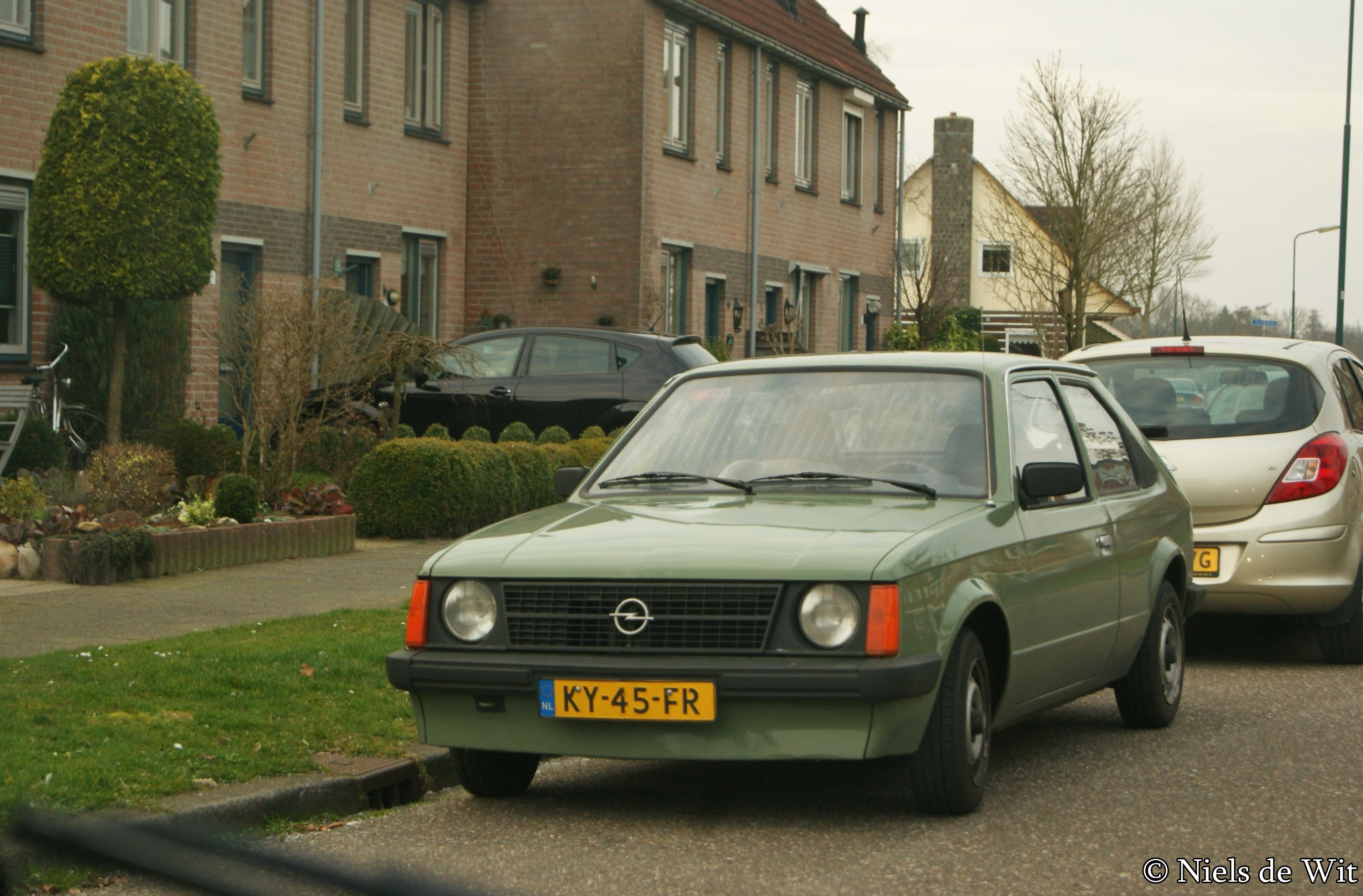 KY-45-FR